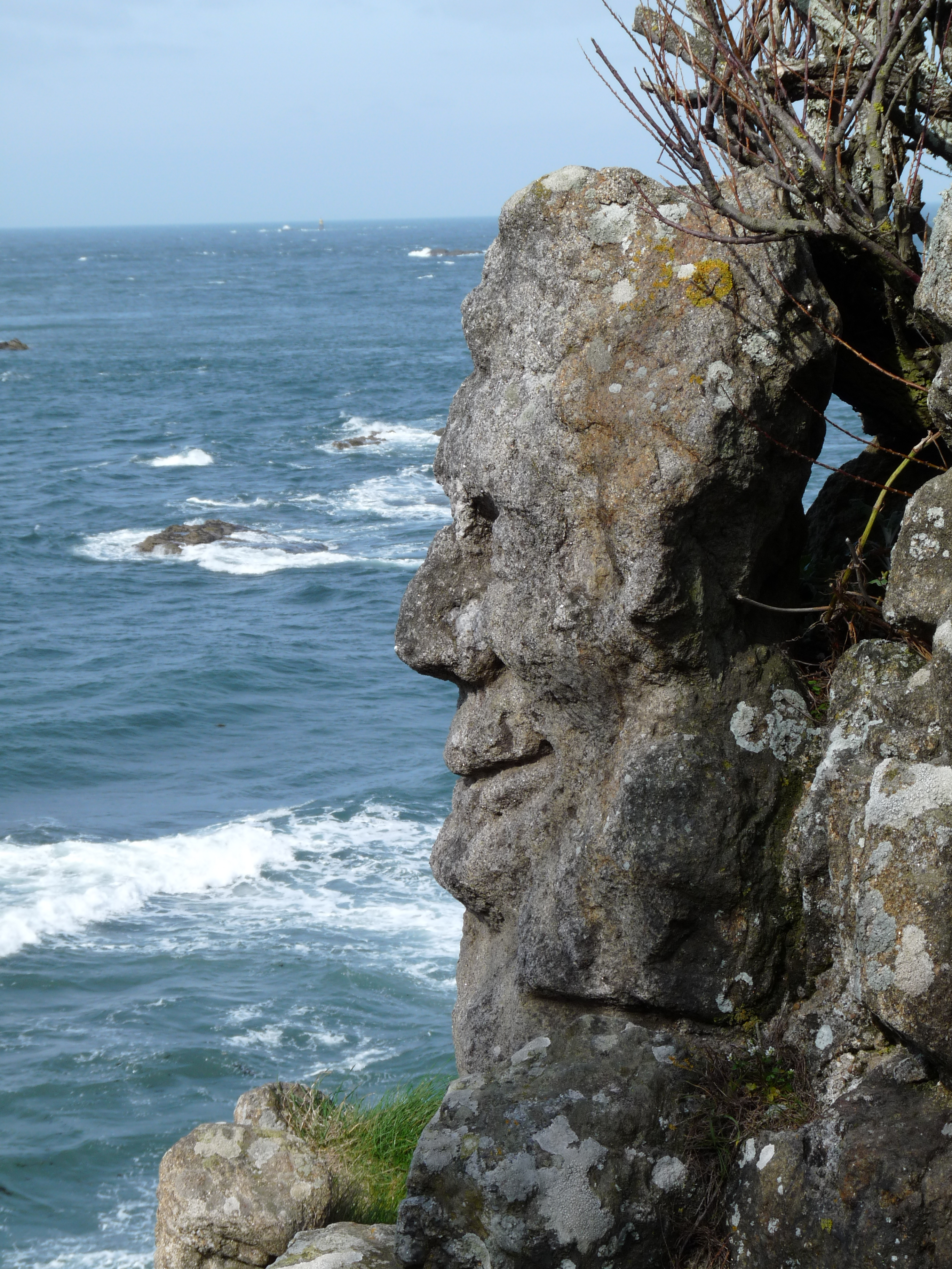 Rochers sculptés de Rothéneuf (Saint-Malo)